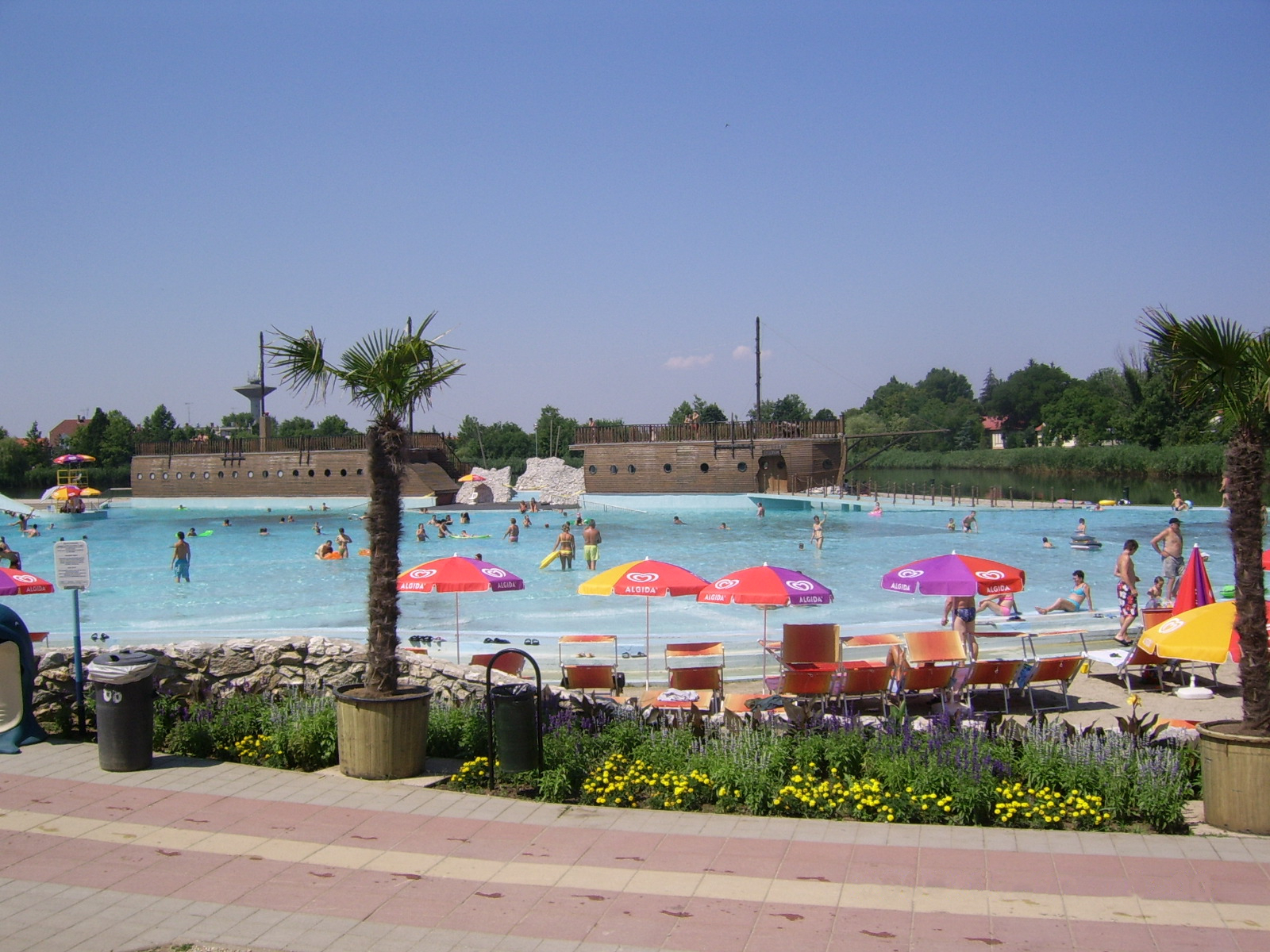 Aquapark Hajdúszoboszlón